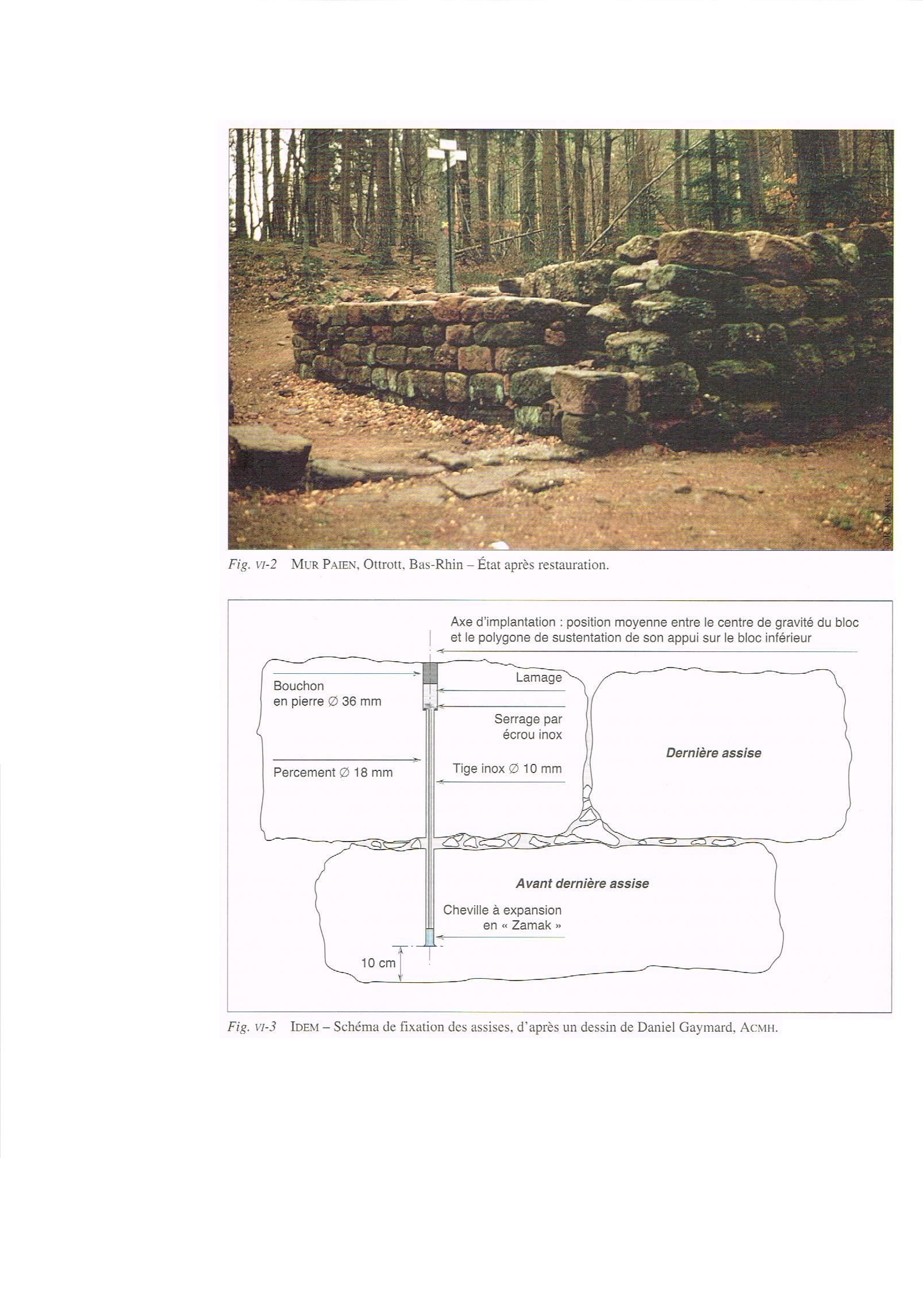 Alsace, Département du Bas-Rhin. Mur païen du Mont Sainte-Odile. Restauration réalisée sous la maîtrise d’œuvre de Daniel Gaymard, Architecte en chef es monuments historiques. La construction de ce mur en appareil cyclopéen aux blocs, liés par des tenons en bois, à double queue d'aronde, suscite certes bien des interrogations de la part des archéologues